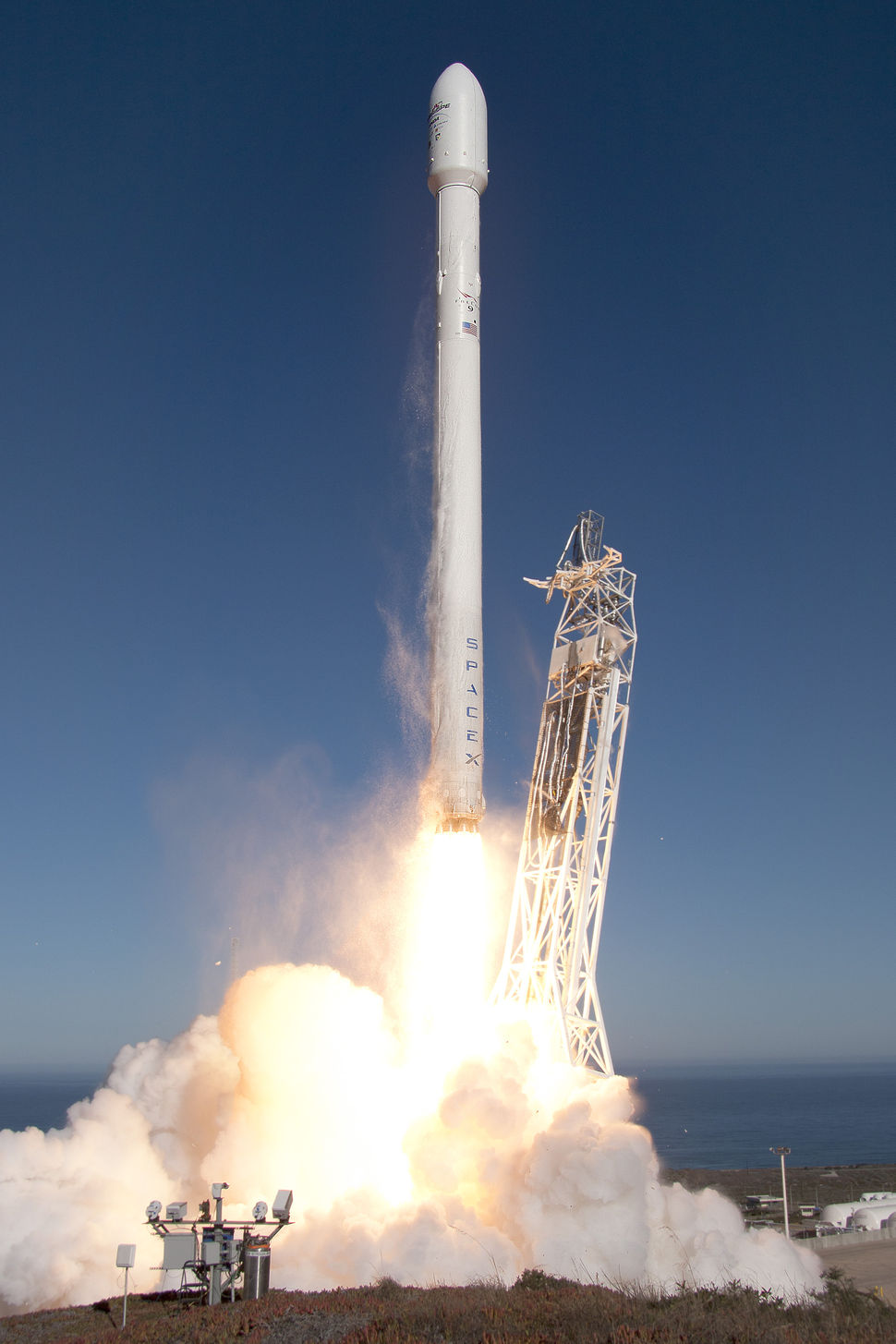 Start rakety Falcon 9 v1.1 nesoucí kanadský satelit CASSIOPE.